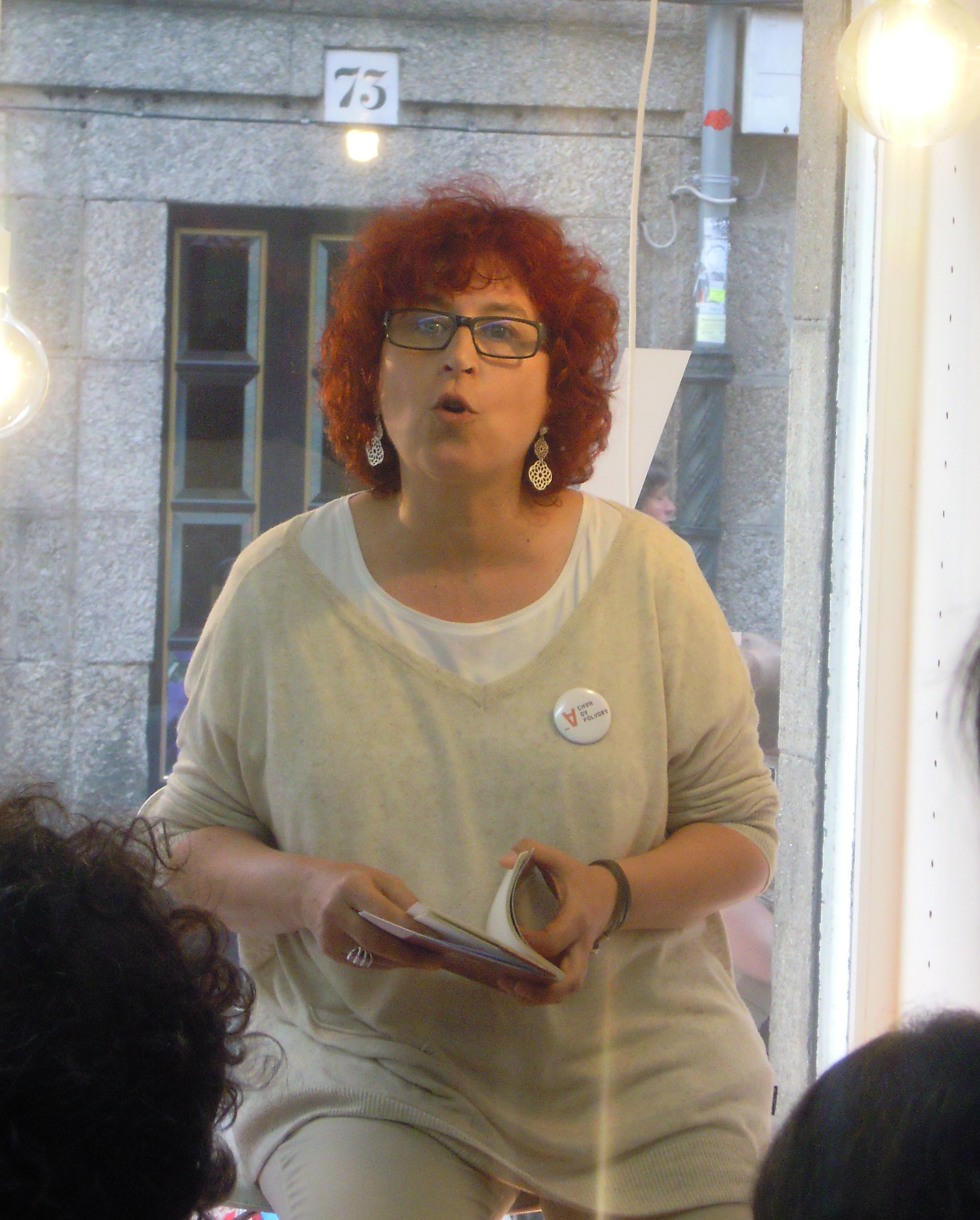 Ana Romaní recitando na libraría Chan da Pólvora